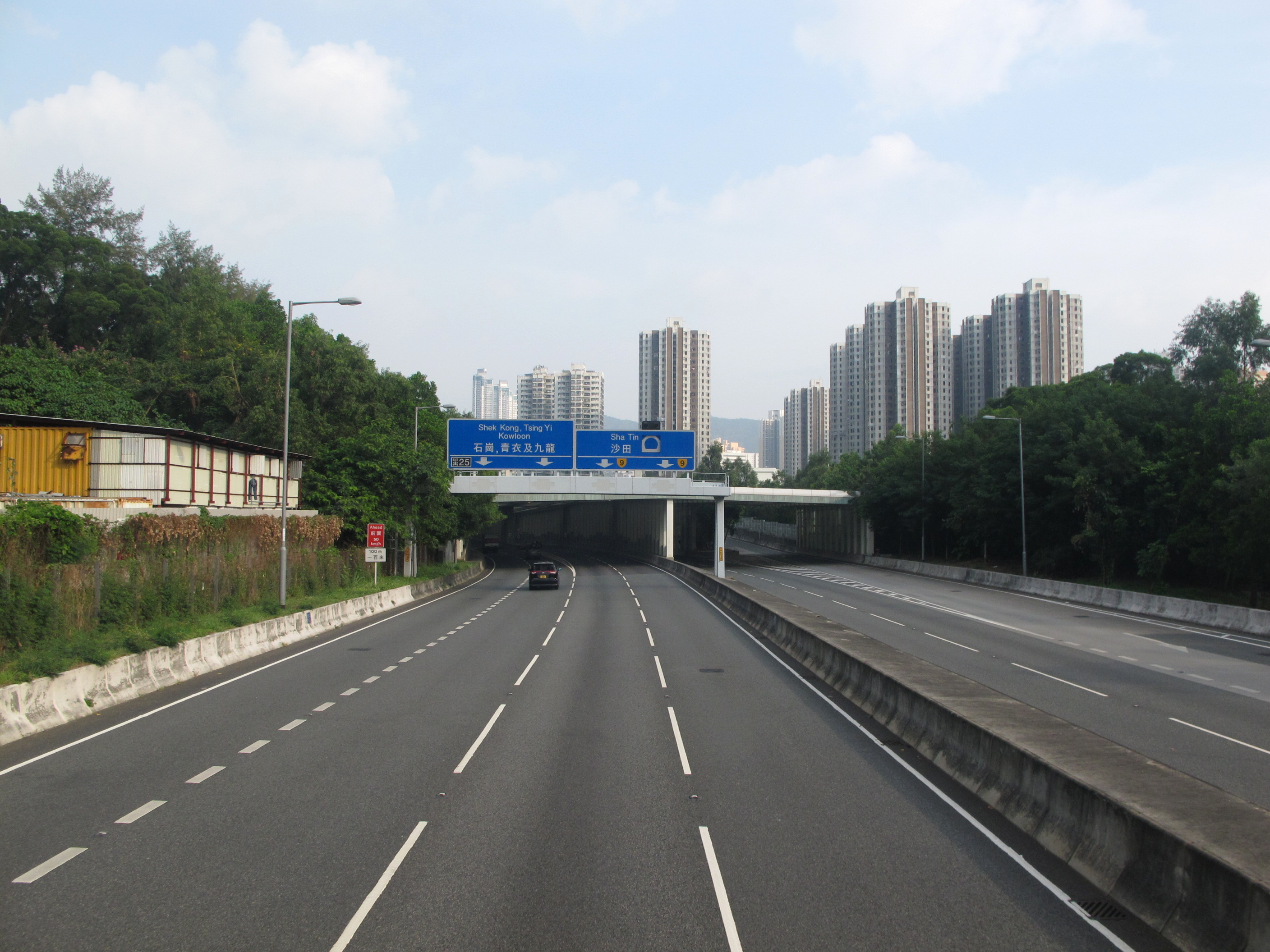 Cheung Pei Shan Road